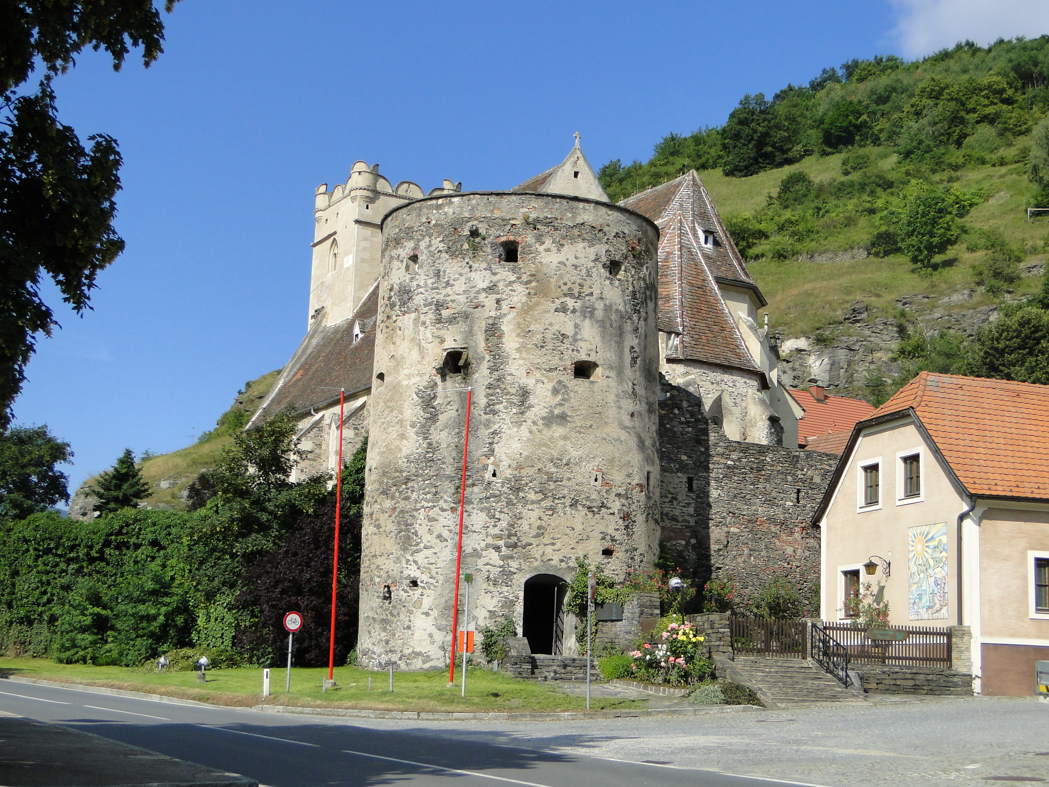 St. Michael in der Wachau This media shows the natural monument in Lower Austria with the ID KR-098 (Trockenrasen St. Michael-West).